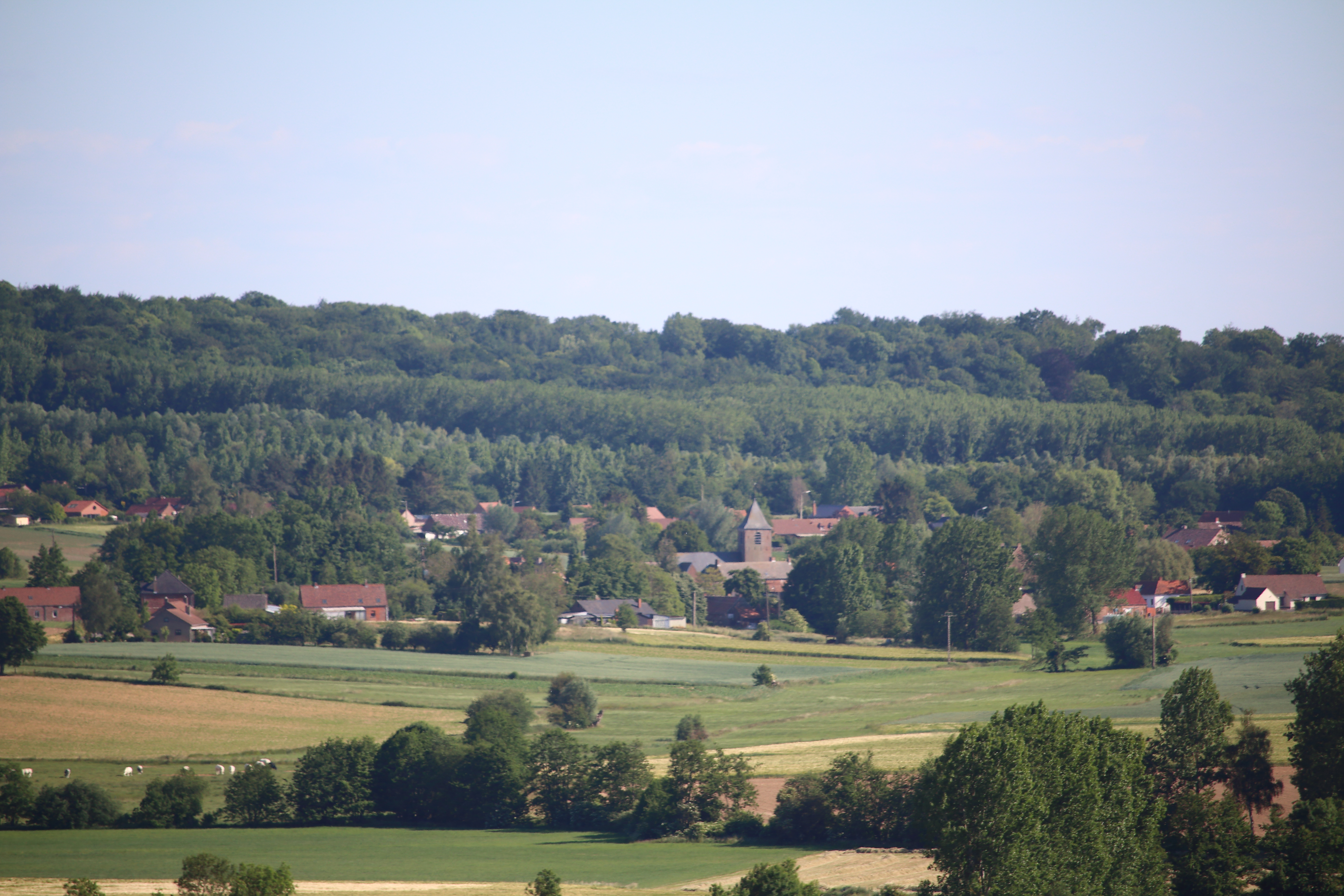 Parc naturel du Pays des Collines, Henegouwen, Wallonië, België